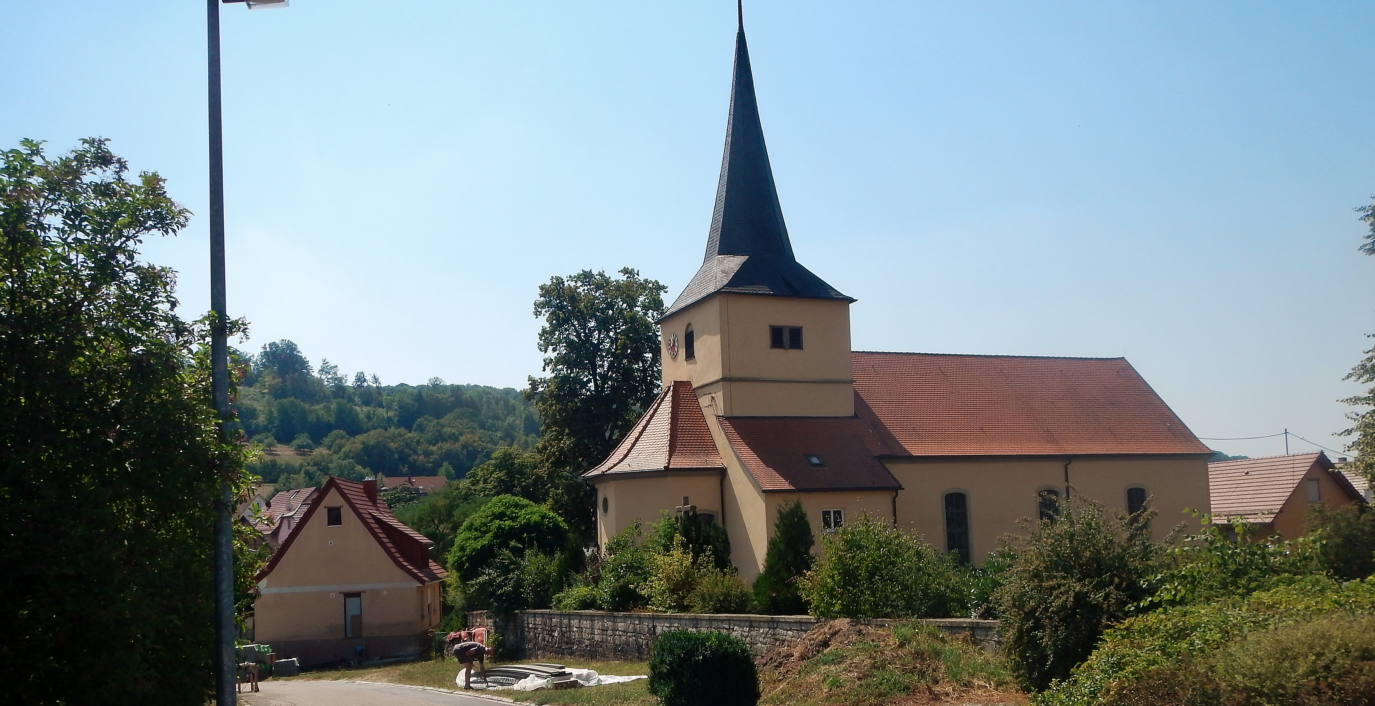 Sankt Georg-Kirche in Marlach